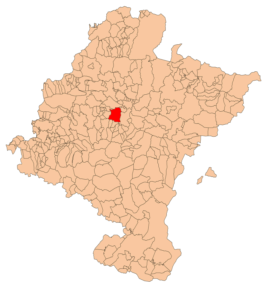 Zizur Zendea Nafarroako mapan kokatua